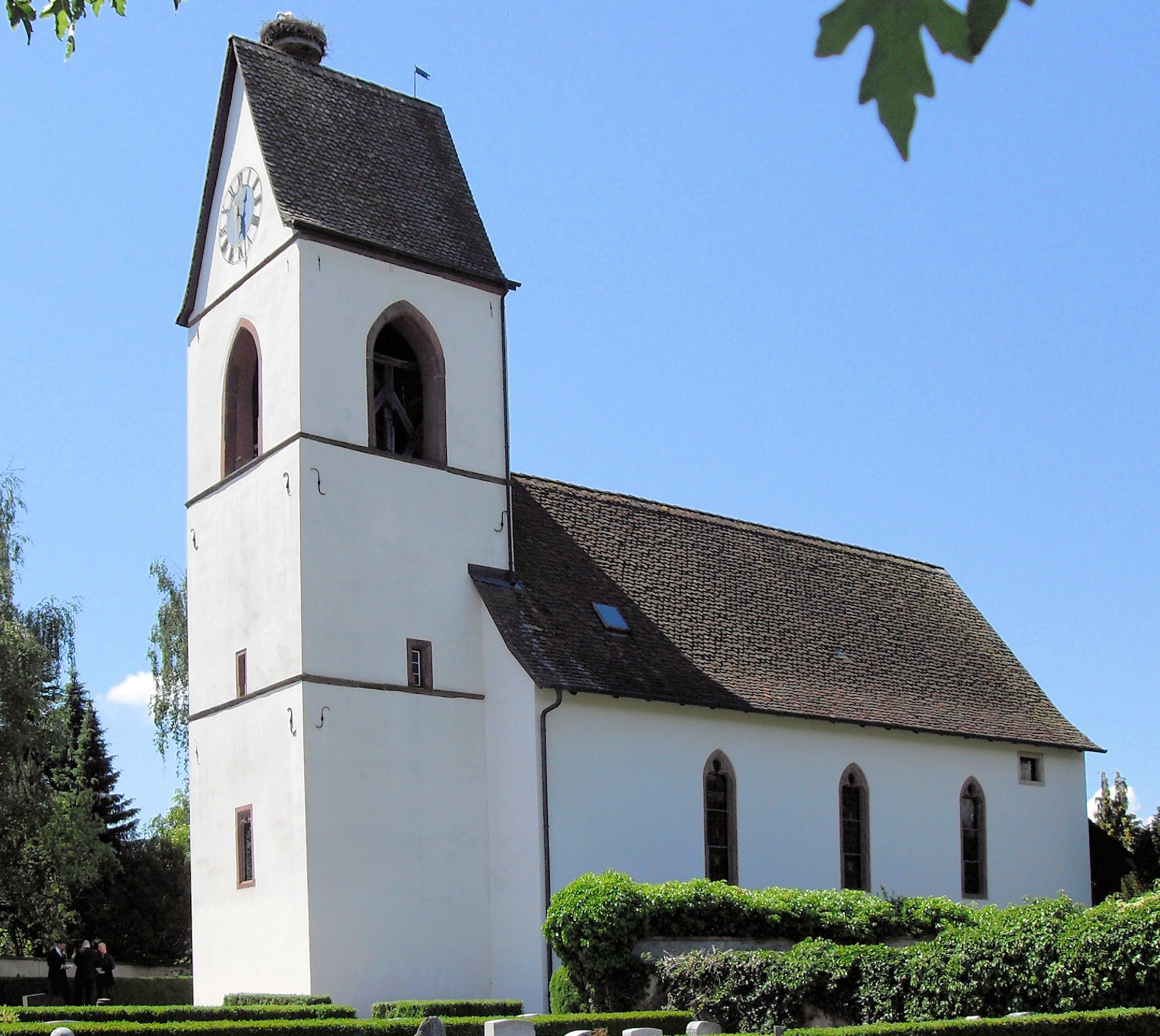 Pfarrkirche St. Antonius in Biel-Benken, Kanton Basel-Landschaft, Schweiz